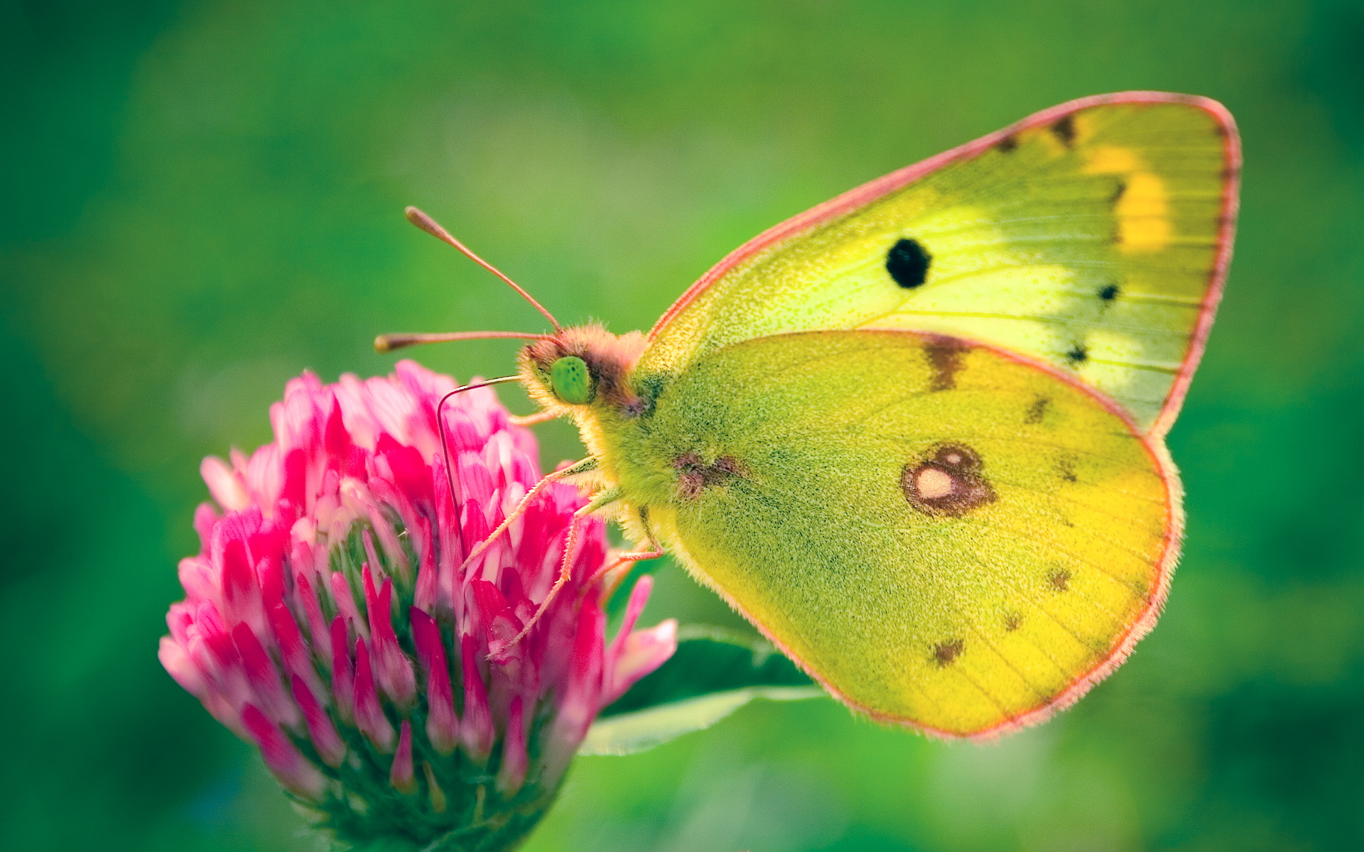 Colias hyale